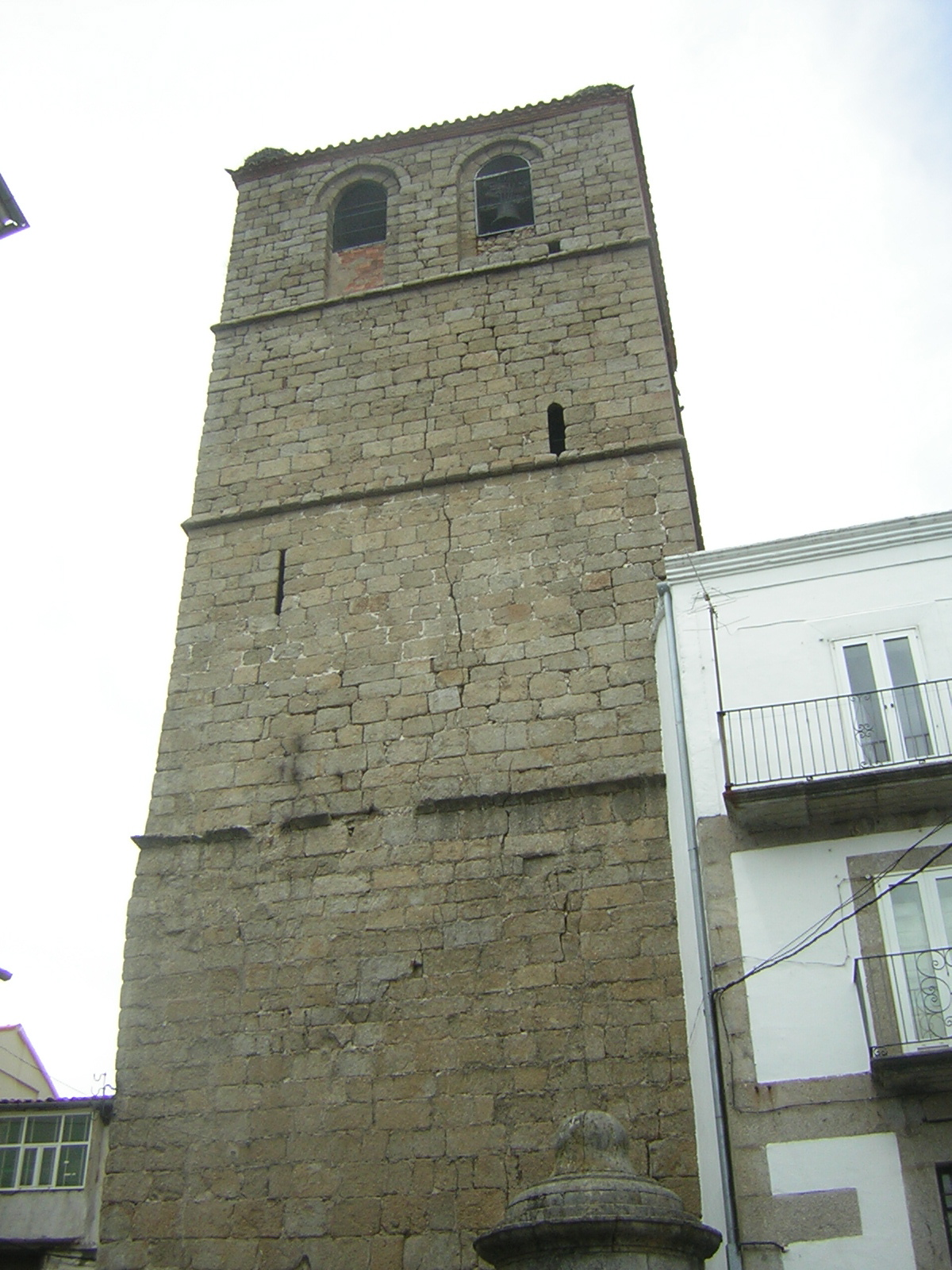 Torre de la iglesia de San Juan. Béjar (Salamanca, España)